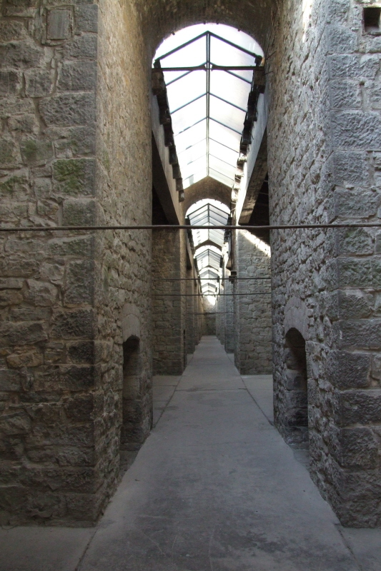 Museumsbark Rüdersdorf: Schachtofenbatterie, die Kathedrale des Kalk Fotograf: Harald Rossa Datum: 3. Oktober 2006 Höher aufgelöste Version ist verfügbar